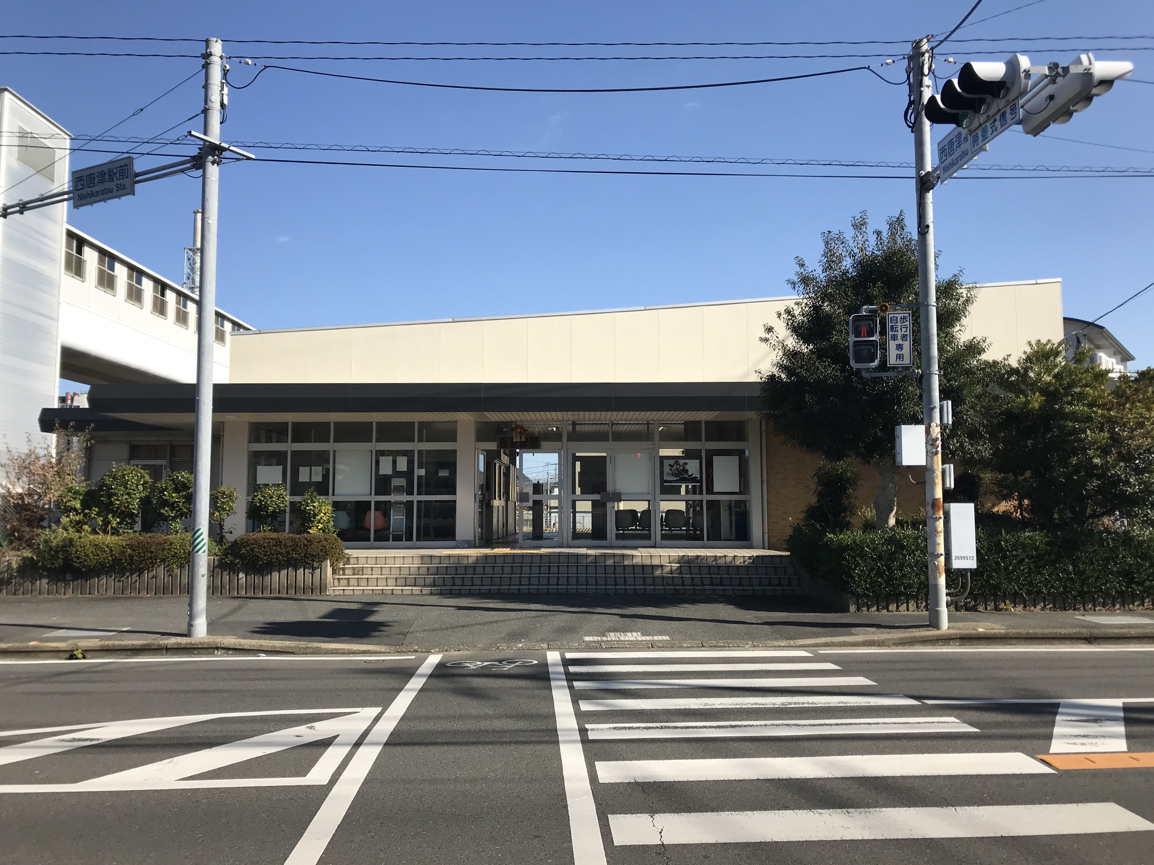 西唐津駅の駅舎